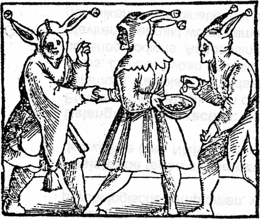 Zonder titel. Houtsnede. Afkomstig uit Thomas Murner (1512) Doktor Murners Narrenbeschwörung, Straatsburg: s.n.